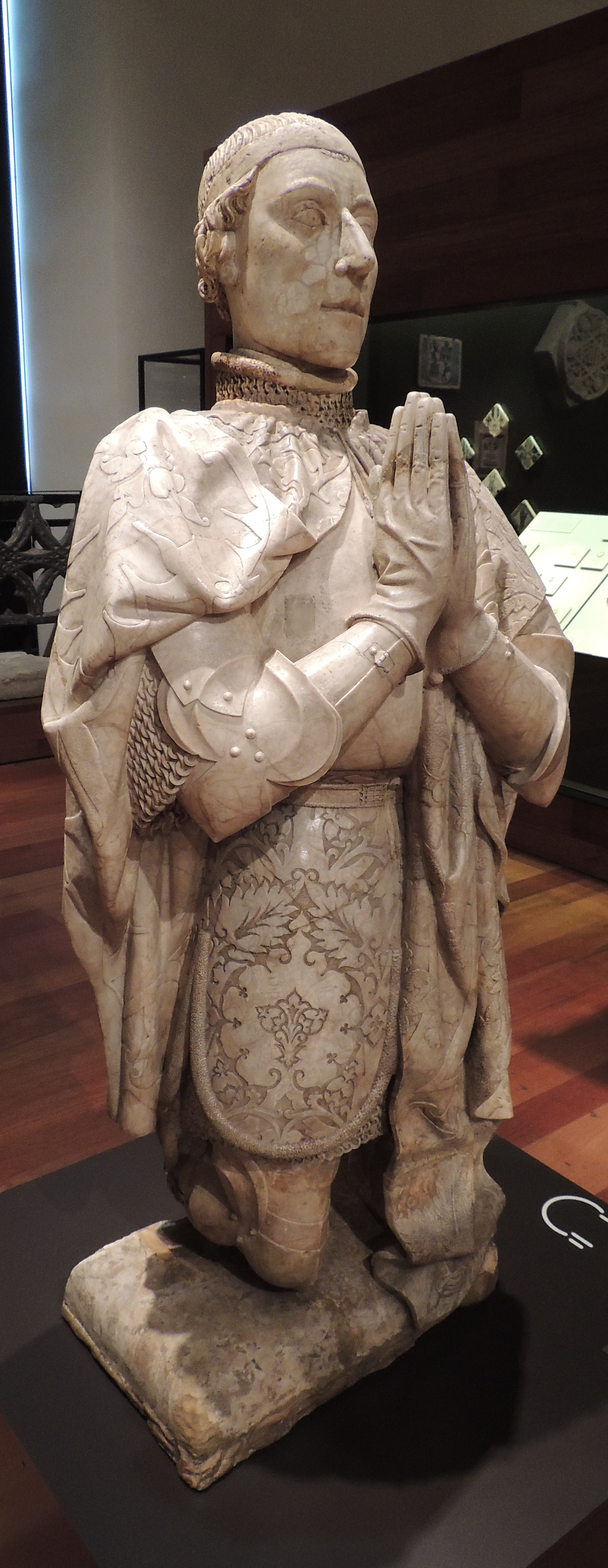 Estatua orante del rey Pedro I de Castilla en el Museo Arqueológico Nacional, situado en la ciudad de Madrid, (España).